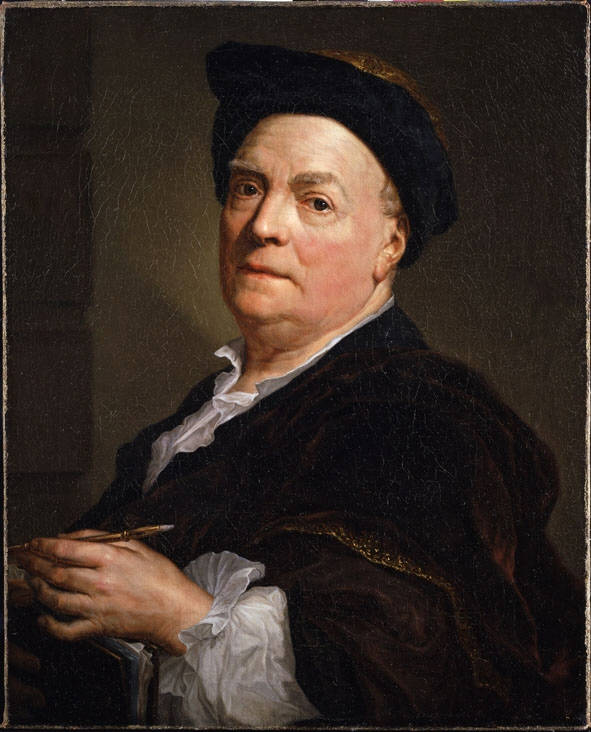 Retrato de Louis de Silvestre por Anton Raphael Mengs, óleo sobre lienzo, 64,6 x 51,7 cm, Madrid, Real Academia de Bellas Artes de San Fernando.